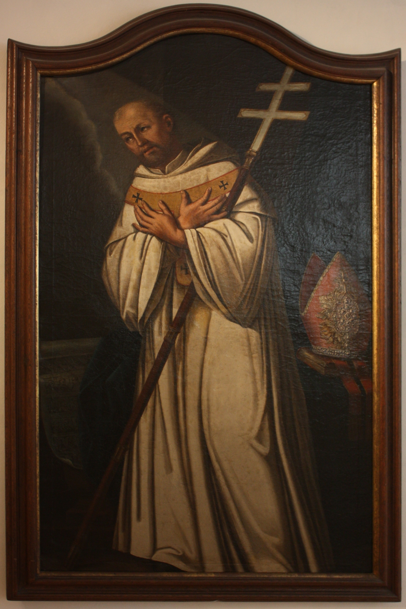 Kloster Eberbach: Bild des Malachias (1666)